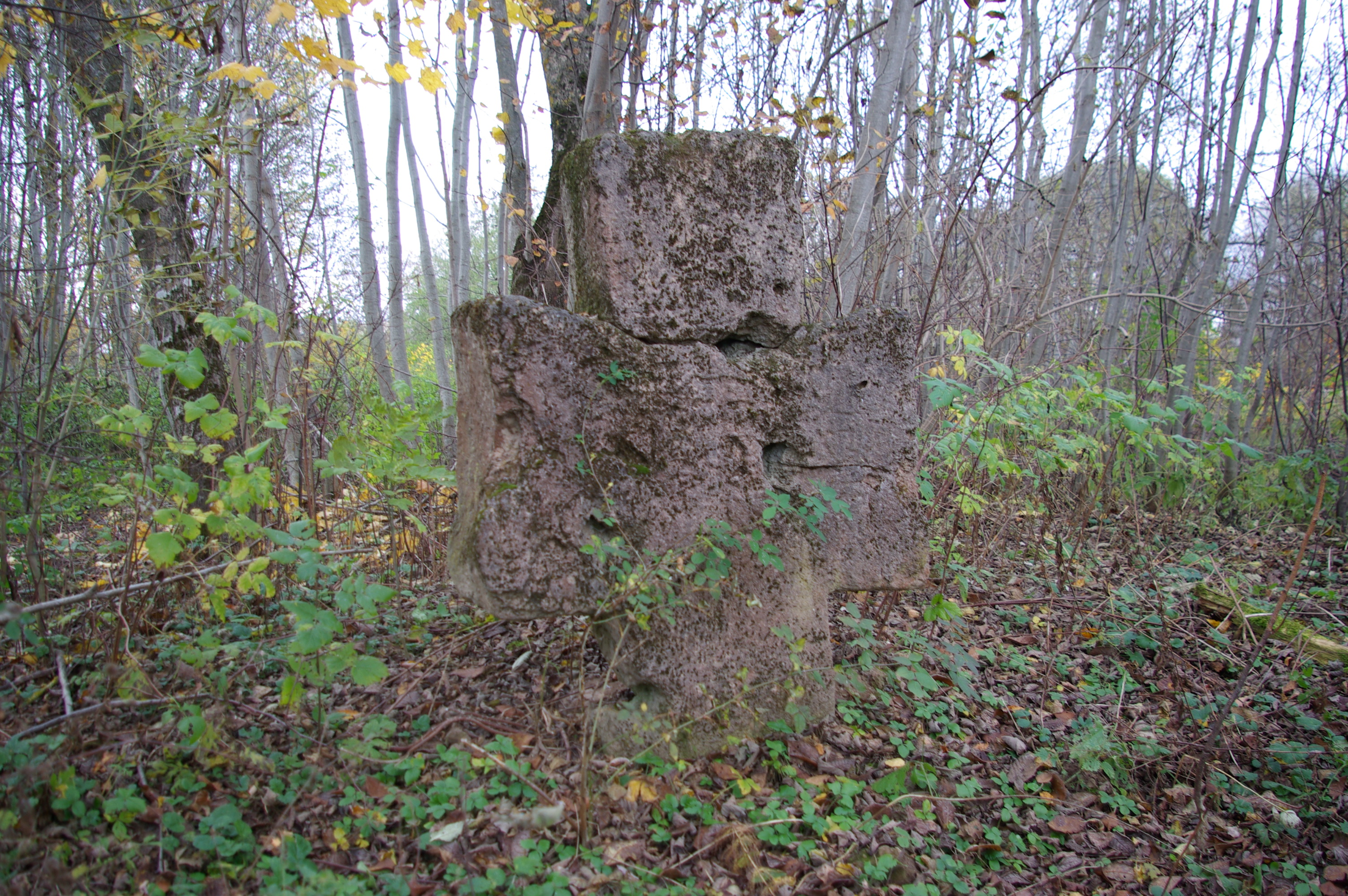 Viro rist ja tsässona koht